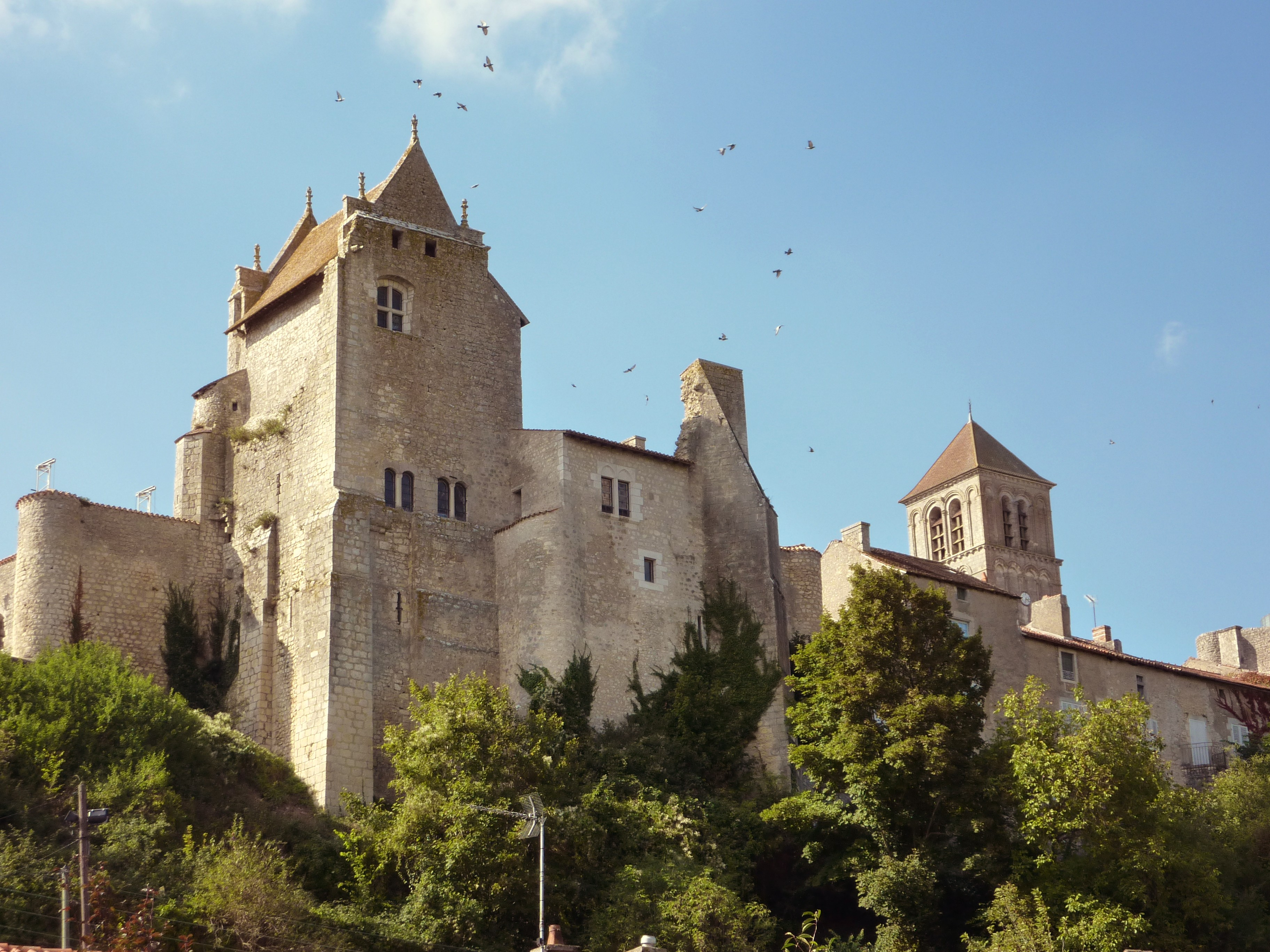 Château d'Harcourt, cité médiévale de Chauvigny (Vienne, France)